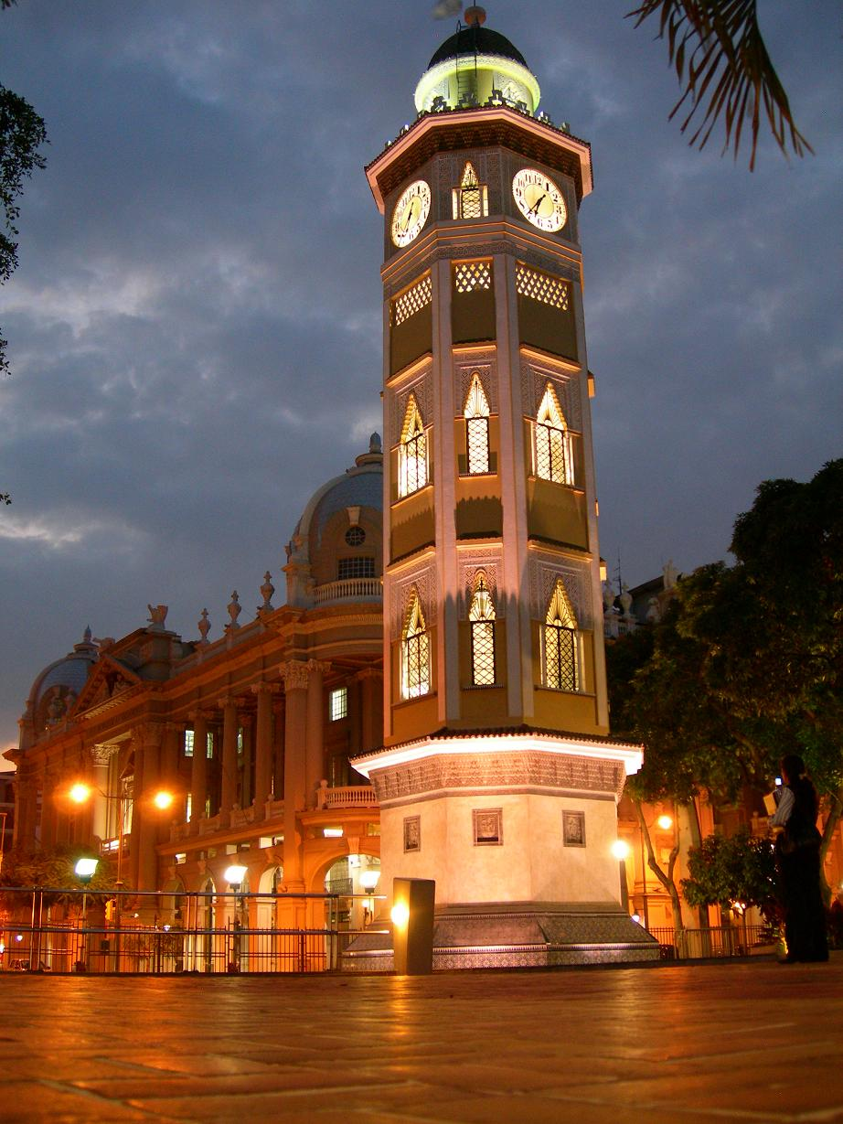 Torre del Reloj en el Malecon de Guayaquil (Ecuador)